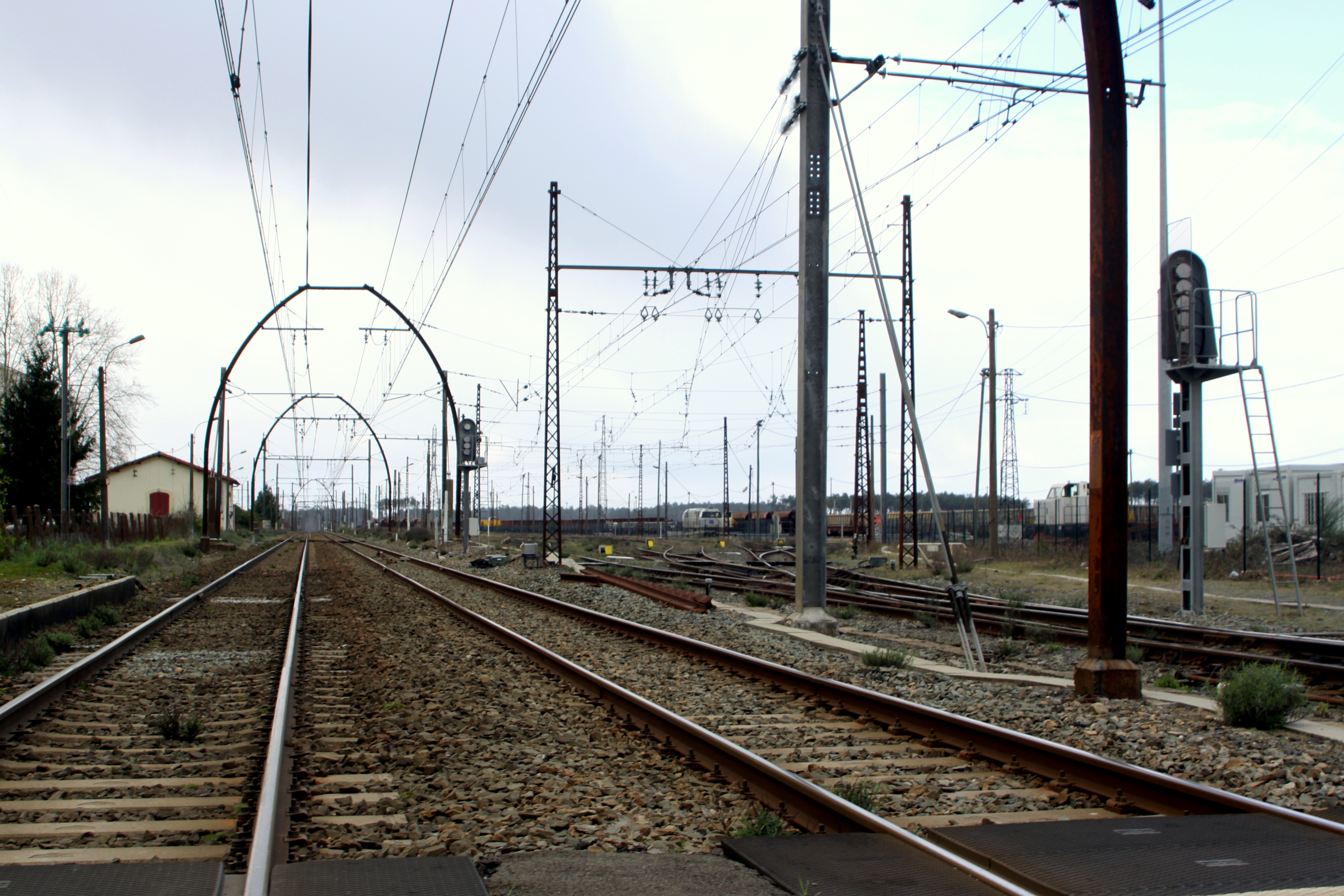 Gare de Laluque (Landes, France)